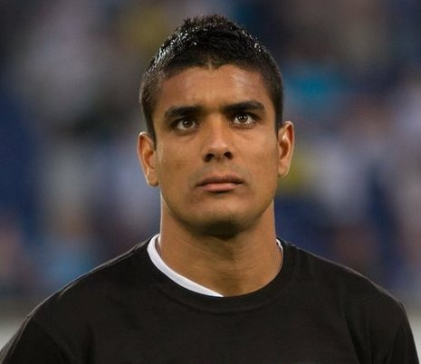 Лео Матос під час виступів за Дніпро